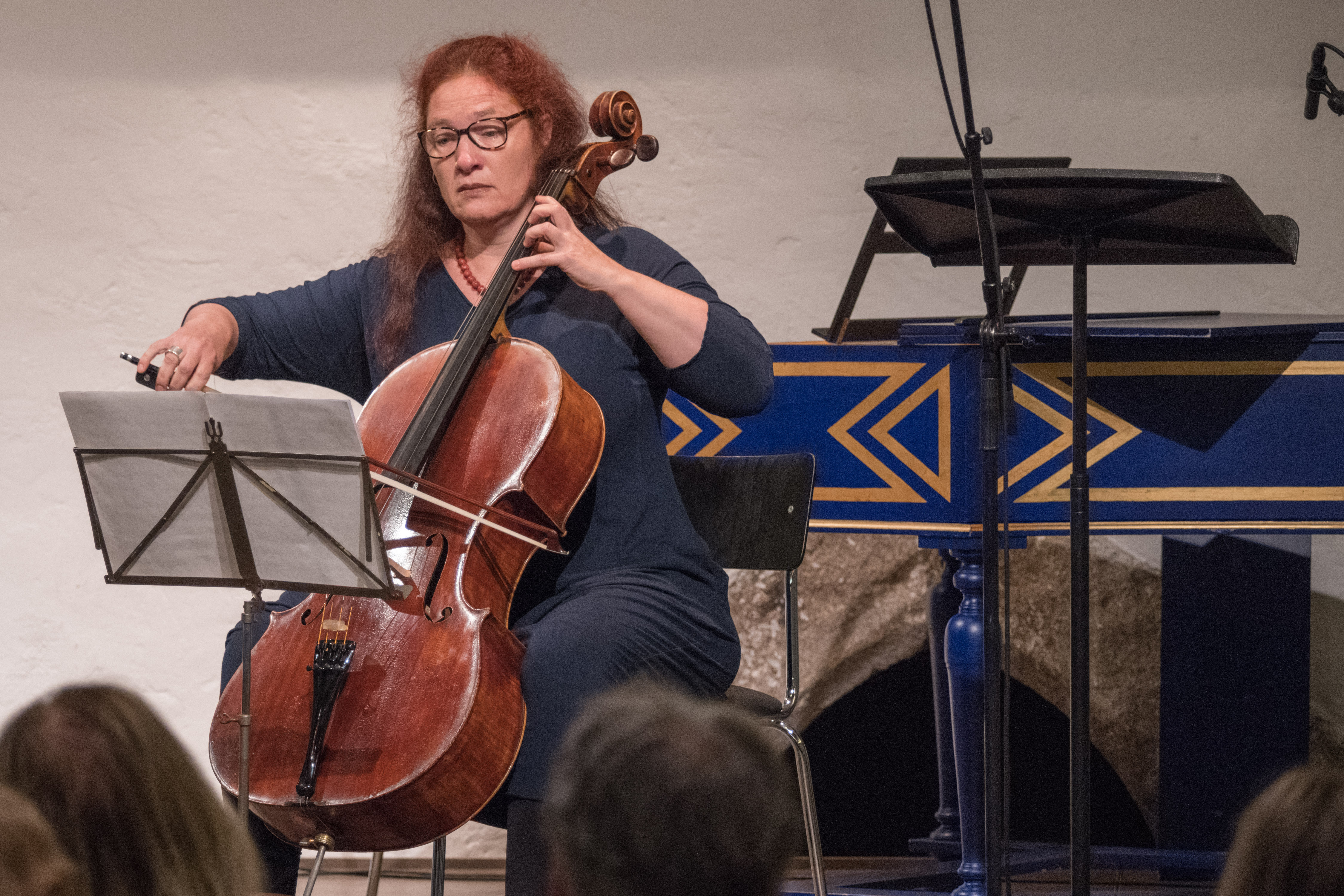 Klassik-Treffpunkt im Salzhof Freistadt: Anja Schröder